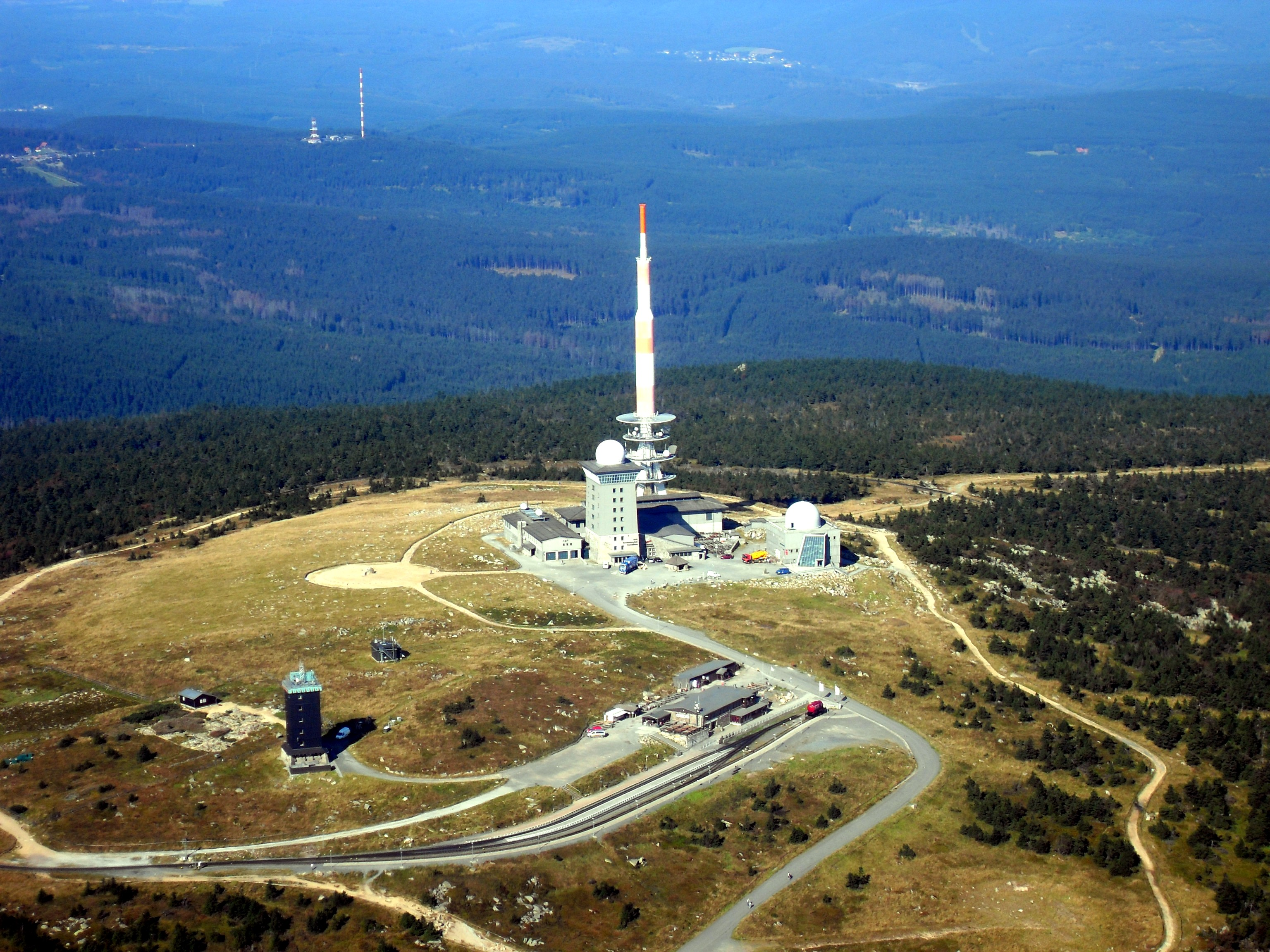 Luftbild der Brockenkuppe. Im Hintergrund links oben sieht man die Sendemasten von Torfhaus